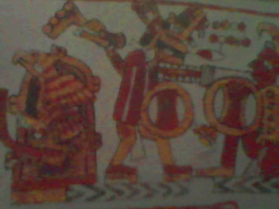 La representativa arma de los pueblos mixtecos y zapotecos, como aparece en el Códice Nuttal, lám. 10